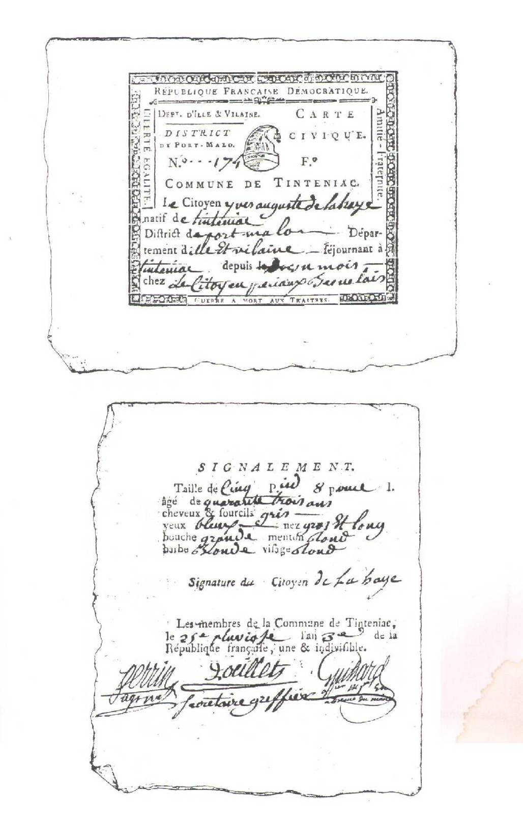 Unique exemplaire de "carte civique" trouvé dans les archives révolutionnaires en Ille-et-Vilaine (parmi d'innombrables passeports intérieurs), utilisé en l'an III. Reproduit en annexe de «Le jugement des Chouans par les commissions révolutionnaires d'Ille-et-Vilaine, 1793-1795», Hervé Tigier, Cercle généalogique d'Ille-et-Vilaine, 1988.